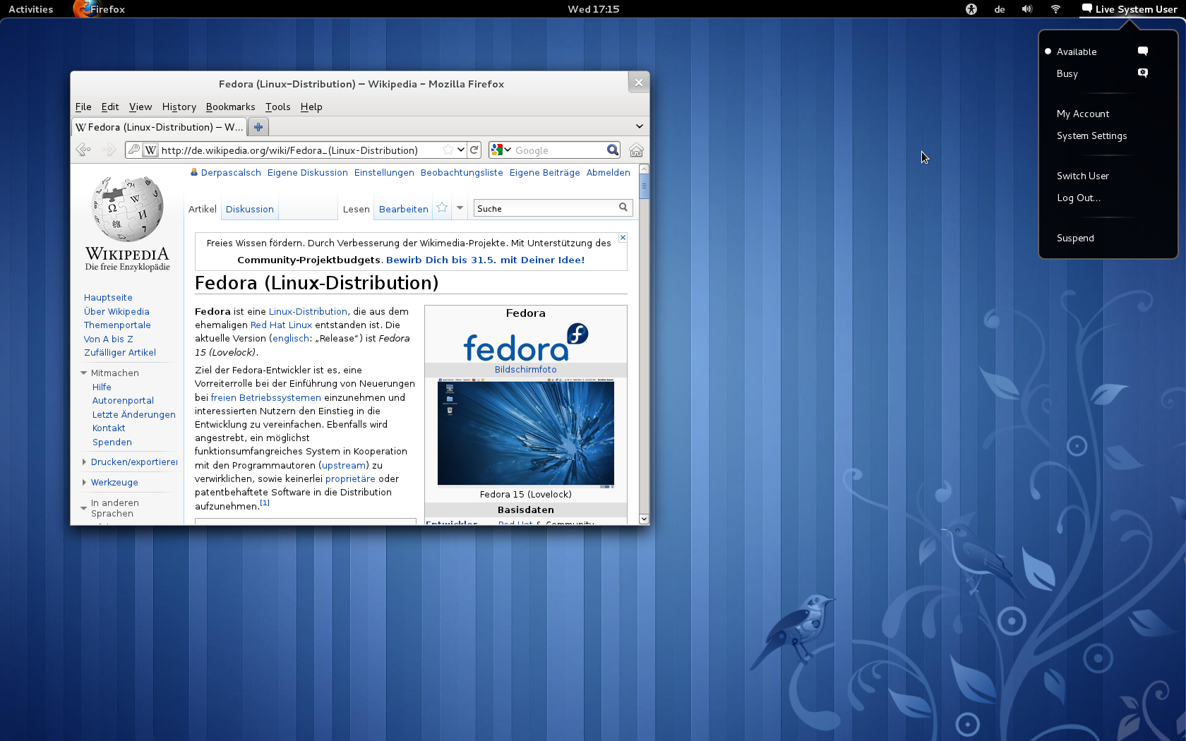 Fedora 15 mit dem Standarddesktop Gnome 3